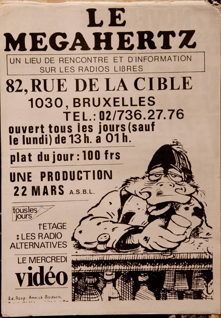 Café Le Mégahertz, 1979, Radio libre en Belgique, Association pour la libération des Ondes - Belgique